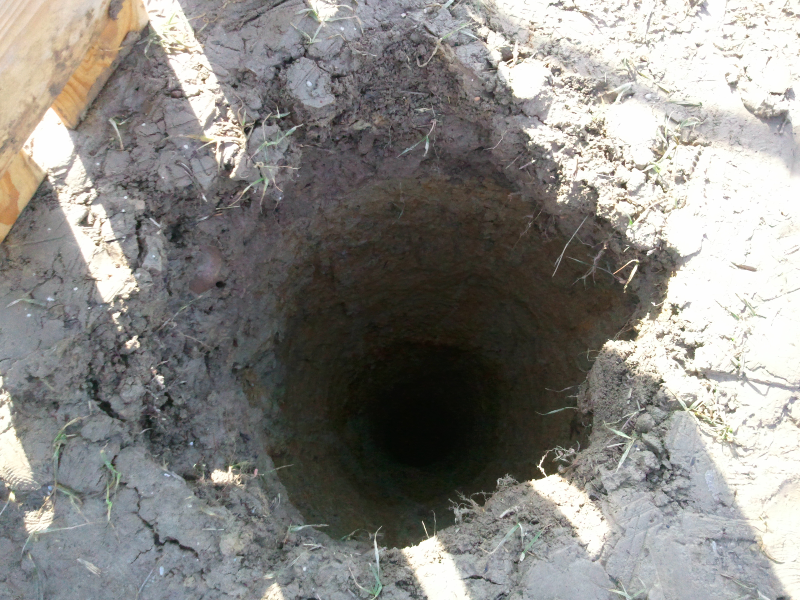 Mysteriöses Erdloch in Neuhofen in Innkreis